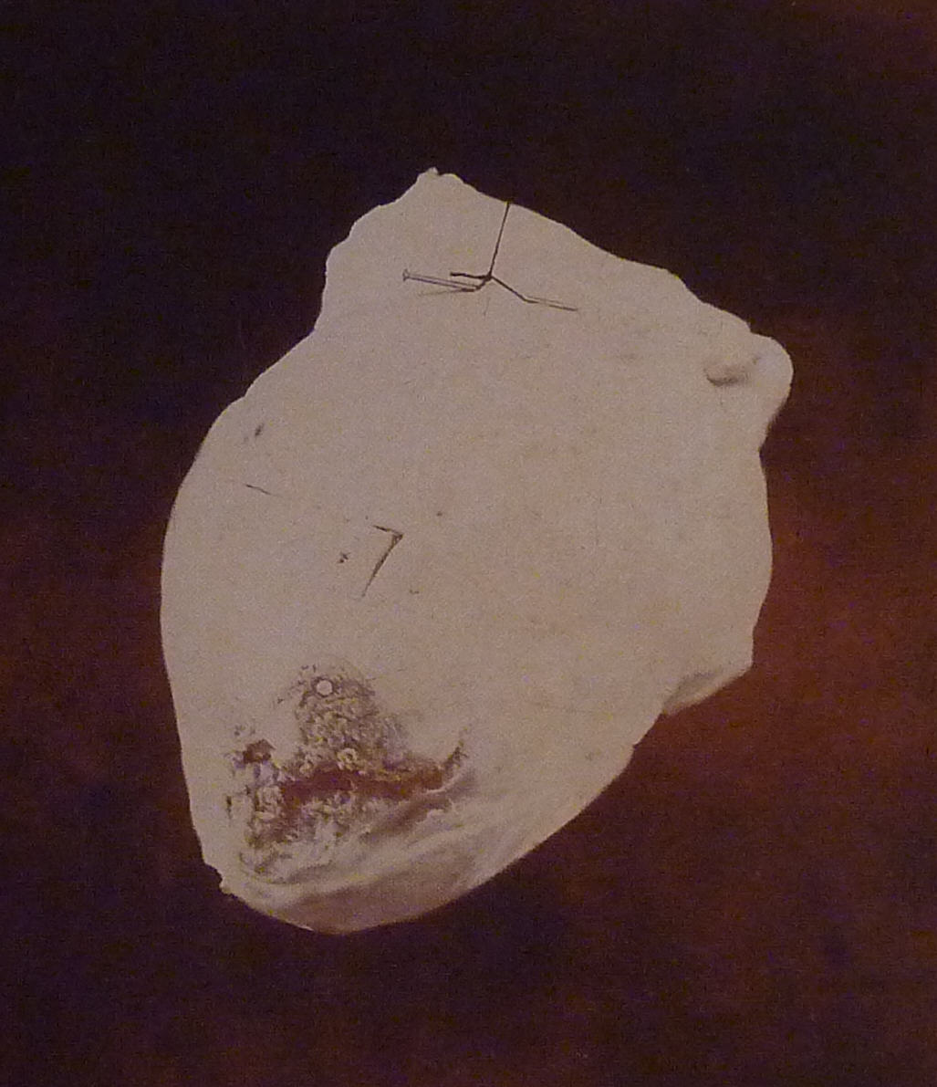 Herzruptur infolge eines Fahrradunfalles.